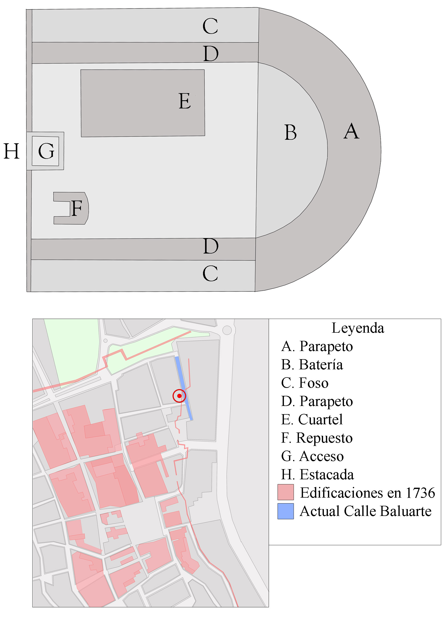 Esquema de la Batería de San Antonio de Algeciras realizada por usuario:Falconaumanni Imagen realizada para Wikimedia a partir de planos antiguos.